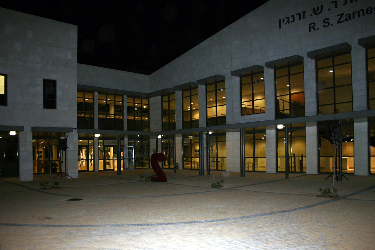 Tel Hai - College